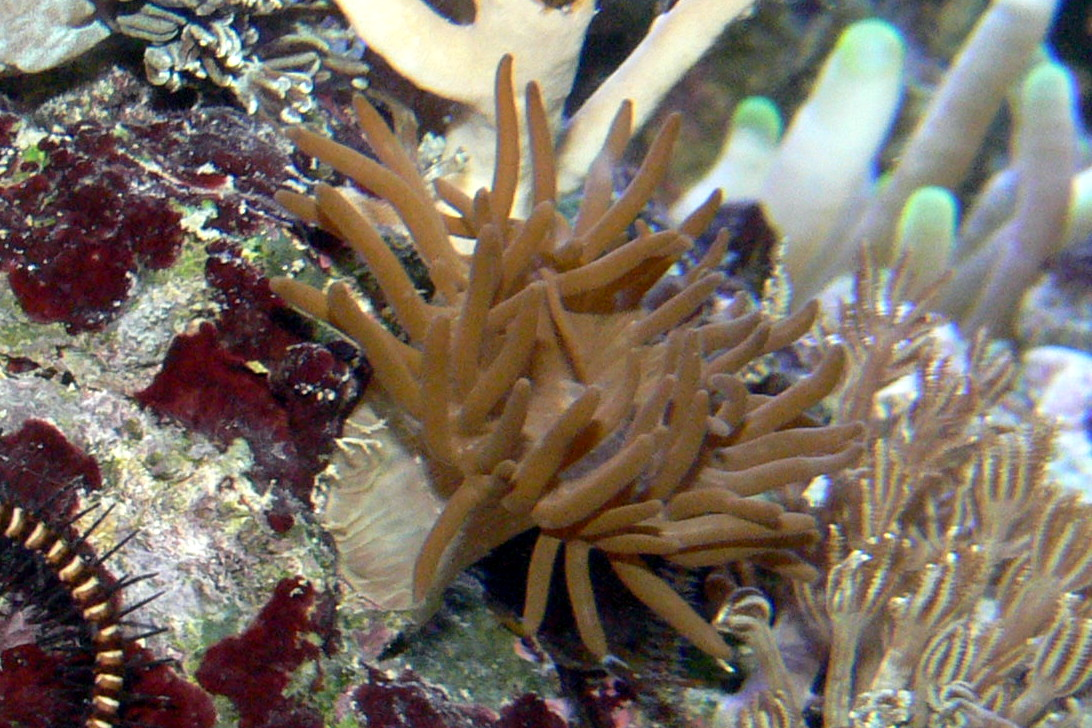 Anemonia cf. majano